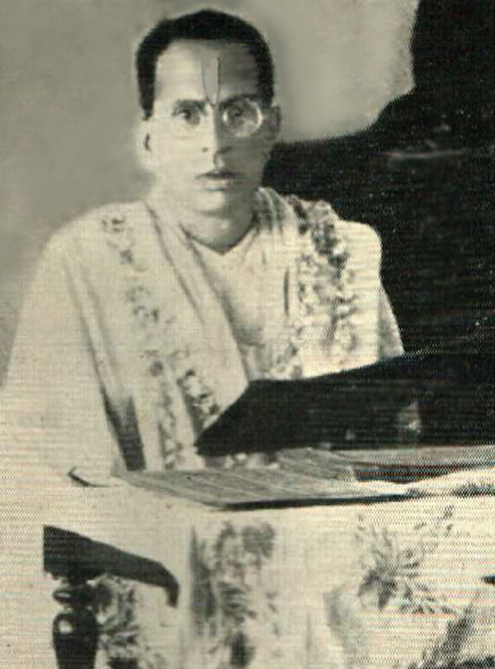 देवर्षि रमानाथ शास्त्री